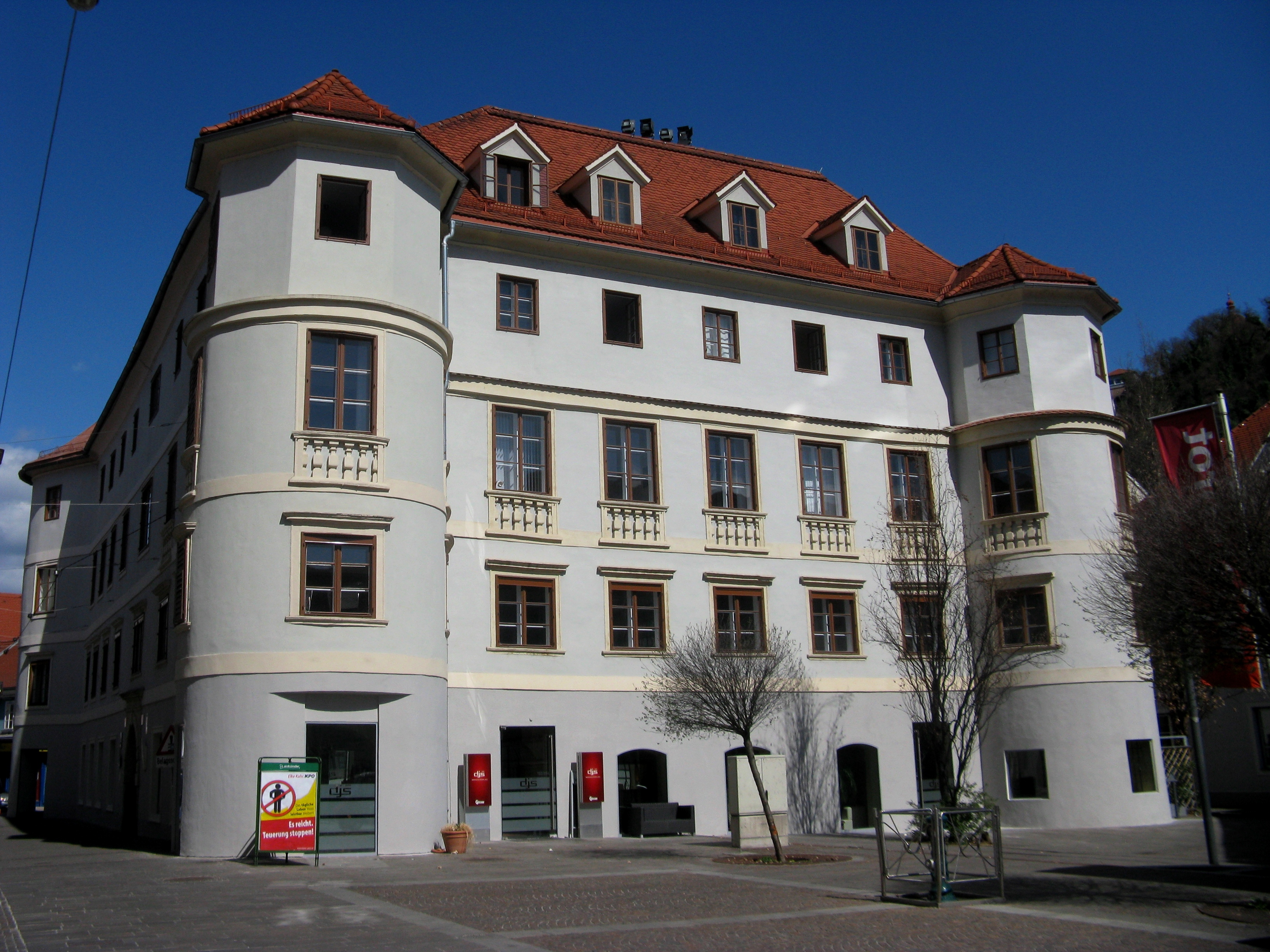 Graz, Palais Wertl von Wertlsberg